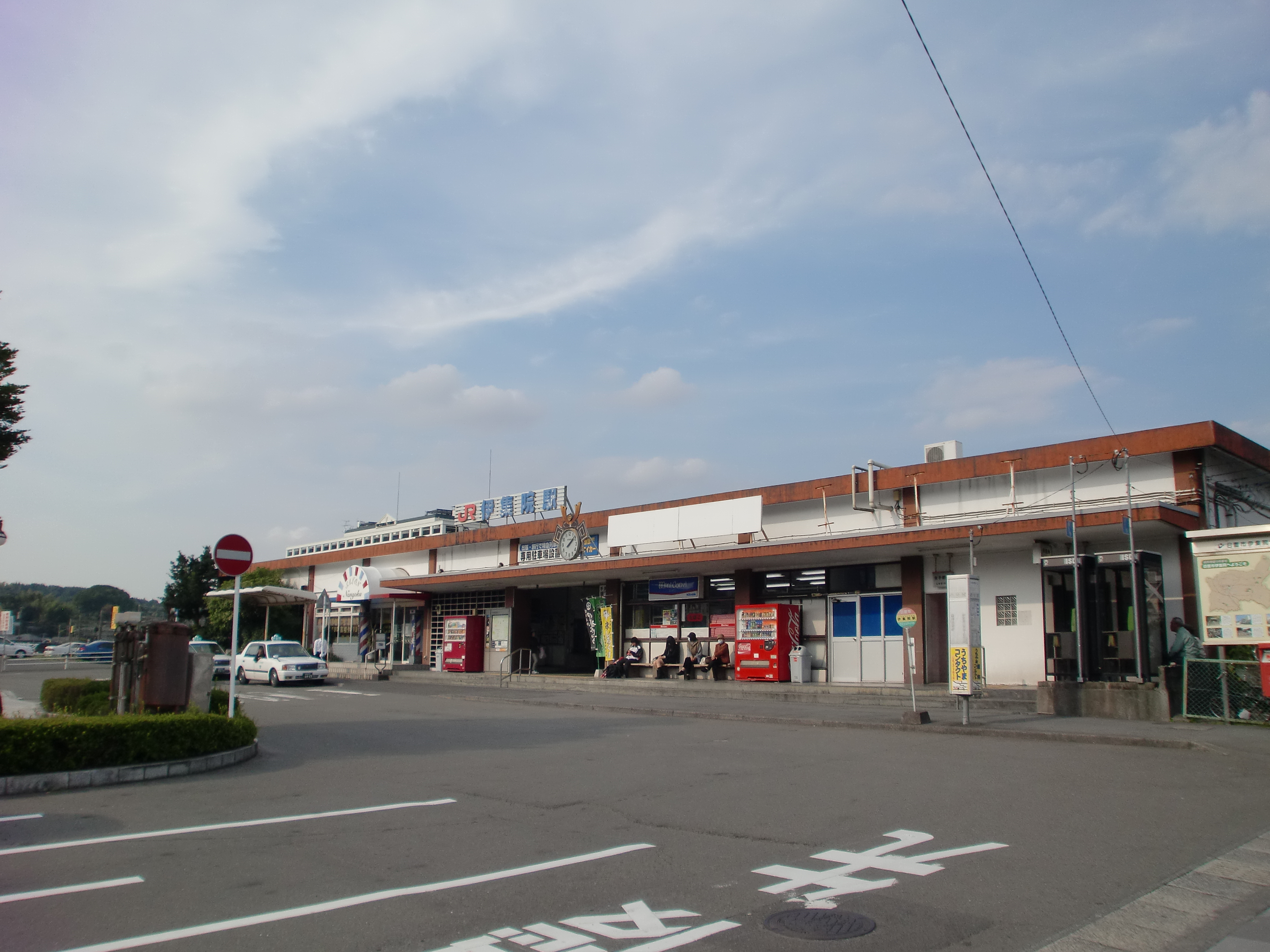 伊集院駅の外観。